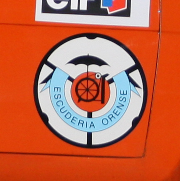 Logo Escuderia Ourense